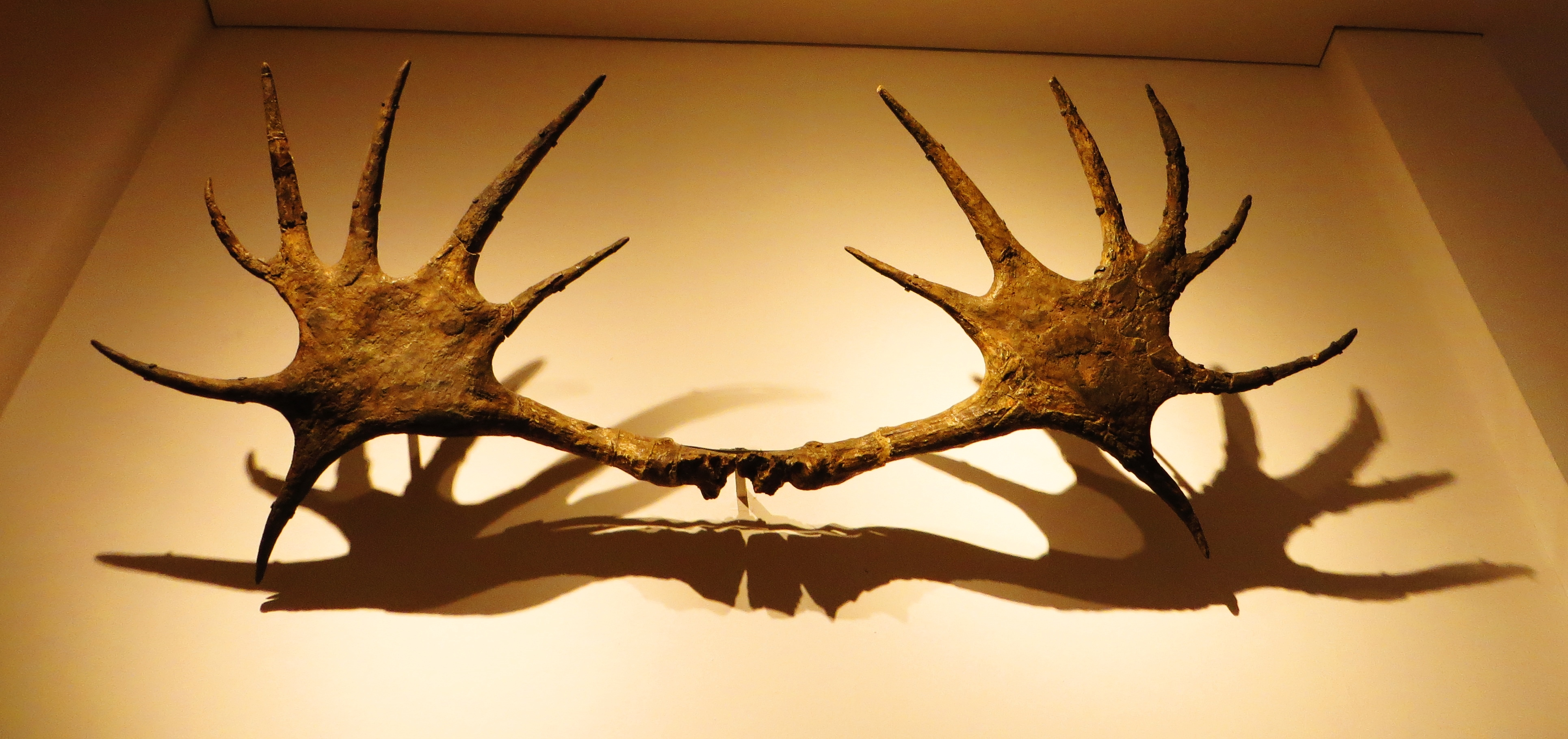 Fossil of Cervalces, an extinct mammal- Took the picture at Museum of Paleontology, Tubingen